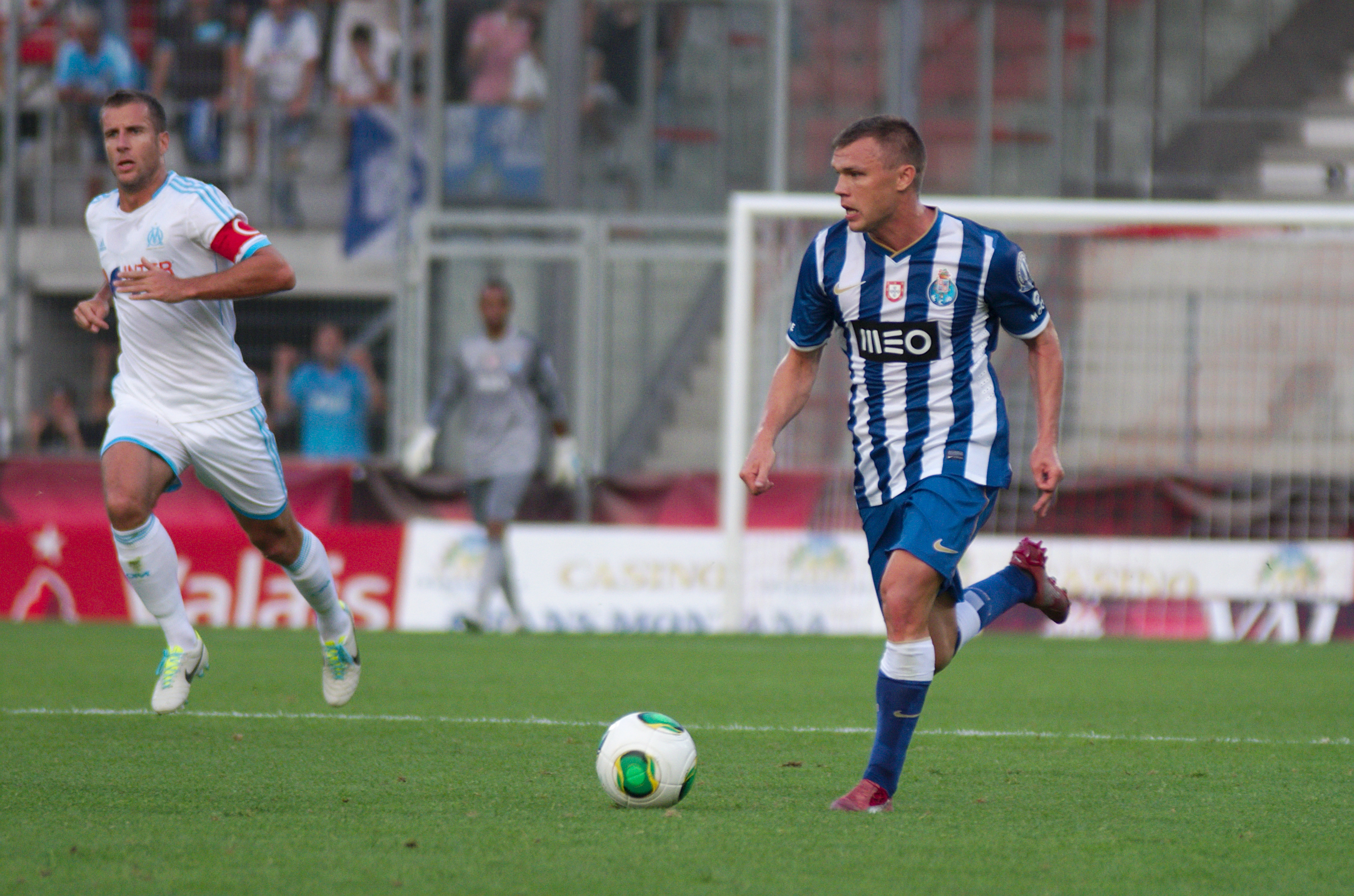 Valais Cup 2013 - OM-FC Porto - 20130713 - Benoit Cheyrou et Marat Izmaylov